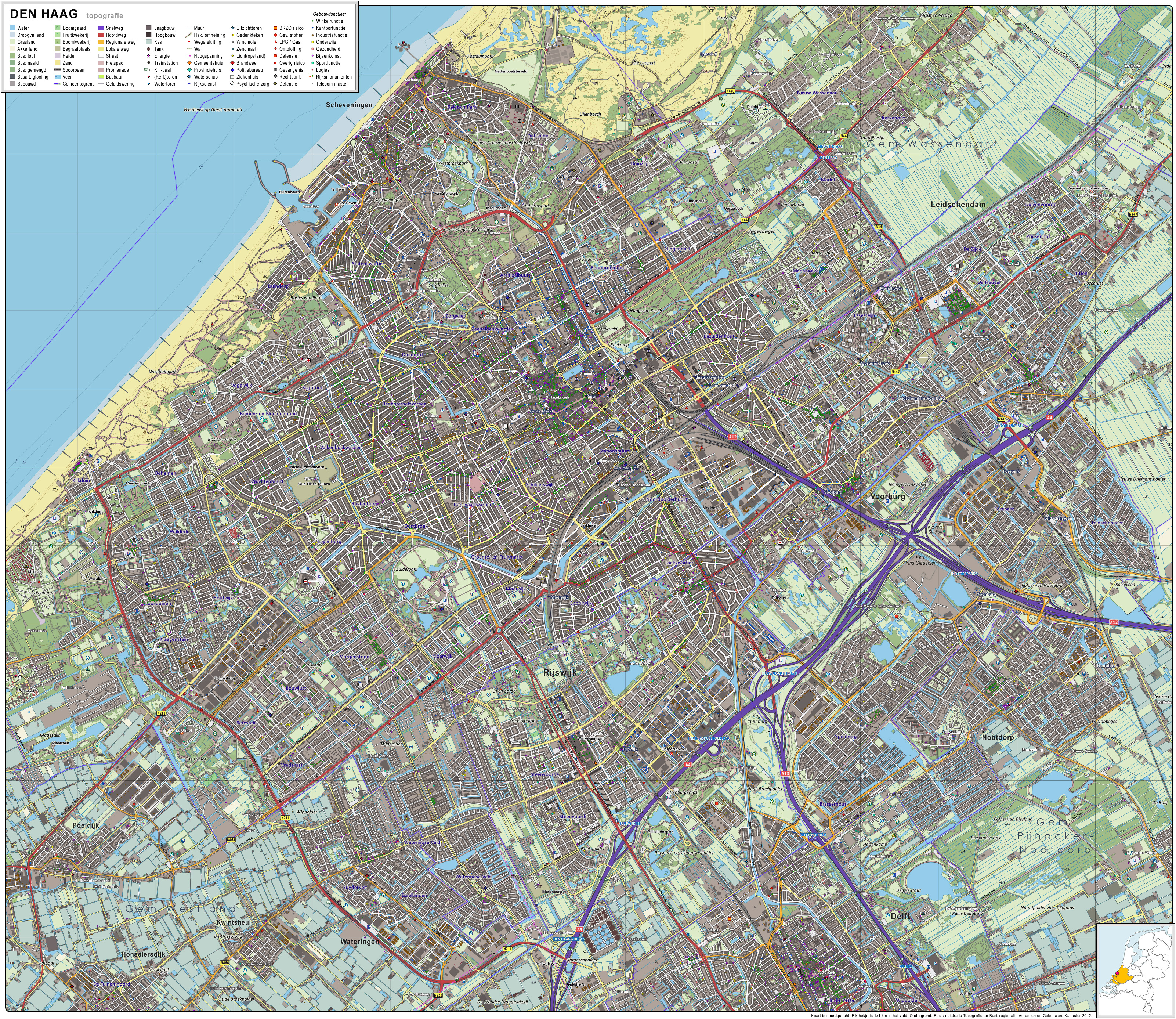 Topografisch beeld van de stad Den Haag (The Hague). Op basis van de GML open geodata van de BRT/Top10NL (basisregistratie Topografie, Kadaster 2012), vrijgegeven door Kadaster op 30-11-2012 onder de Creative Commons BY licentie. Gebouwvlakken vanuit Open Geodata BAG extract (december 2012). Samenstelling en kleurenschema: Jan-Willem van Aalst, met QuantumGIS en Photoshop.